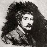 Selbstportrait, Kaltnadelradierung